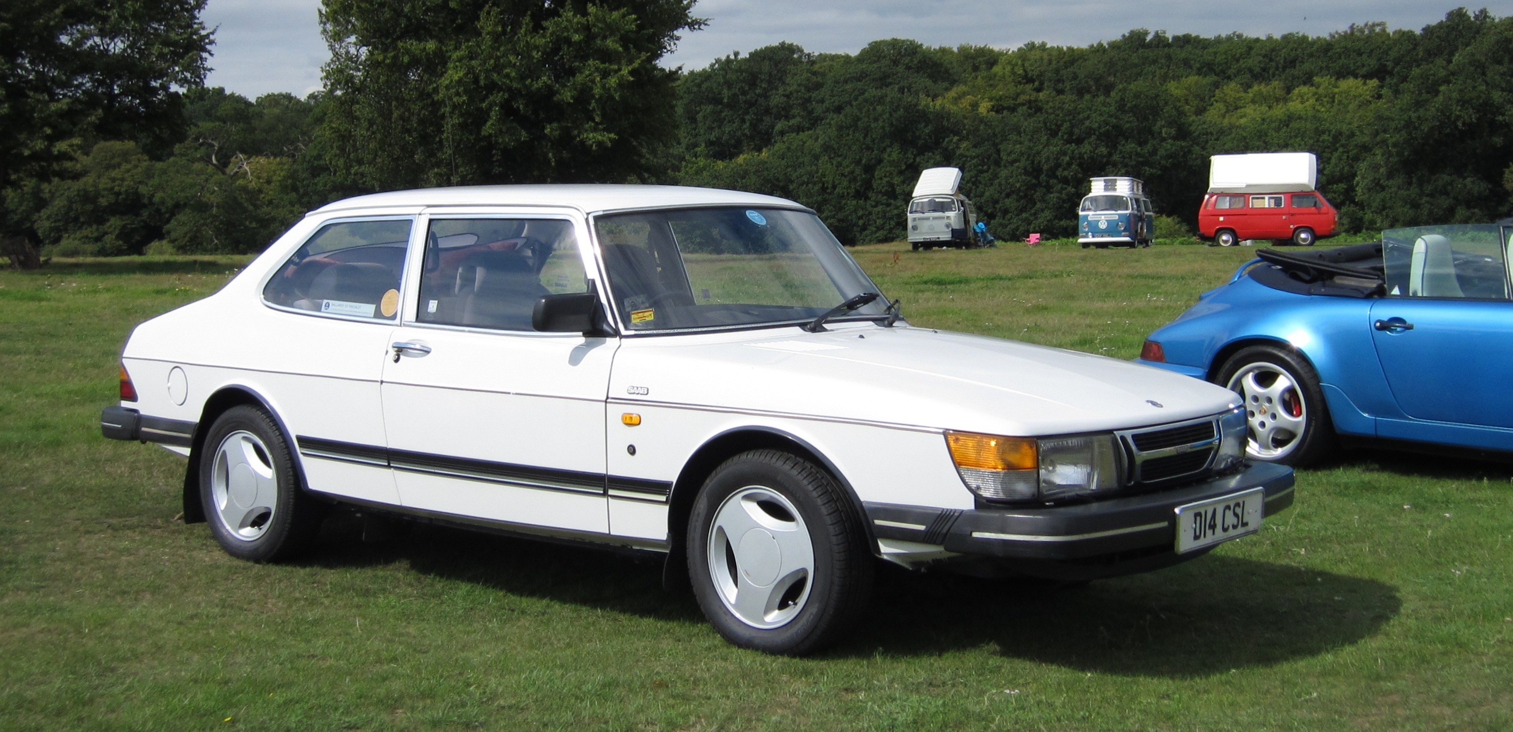 Saab 900 2-door at Knebworth classic car show